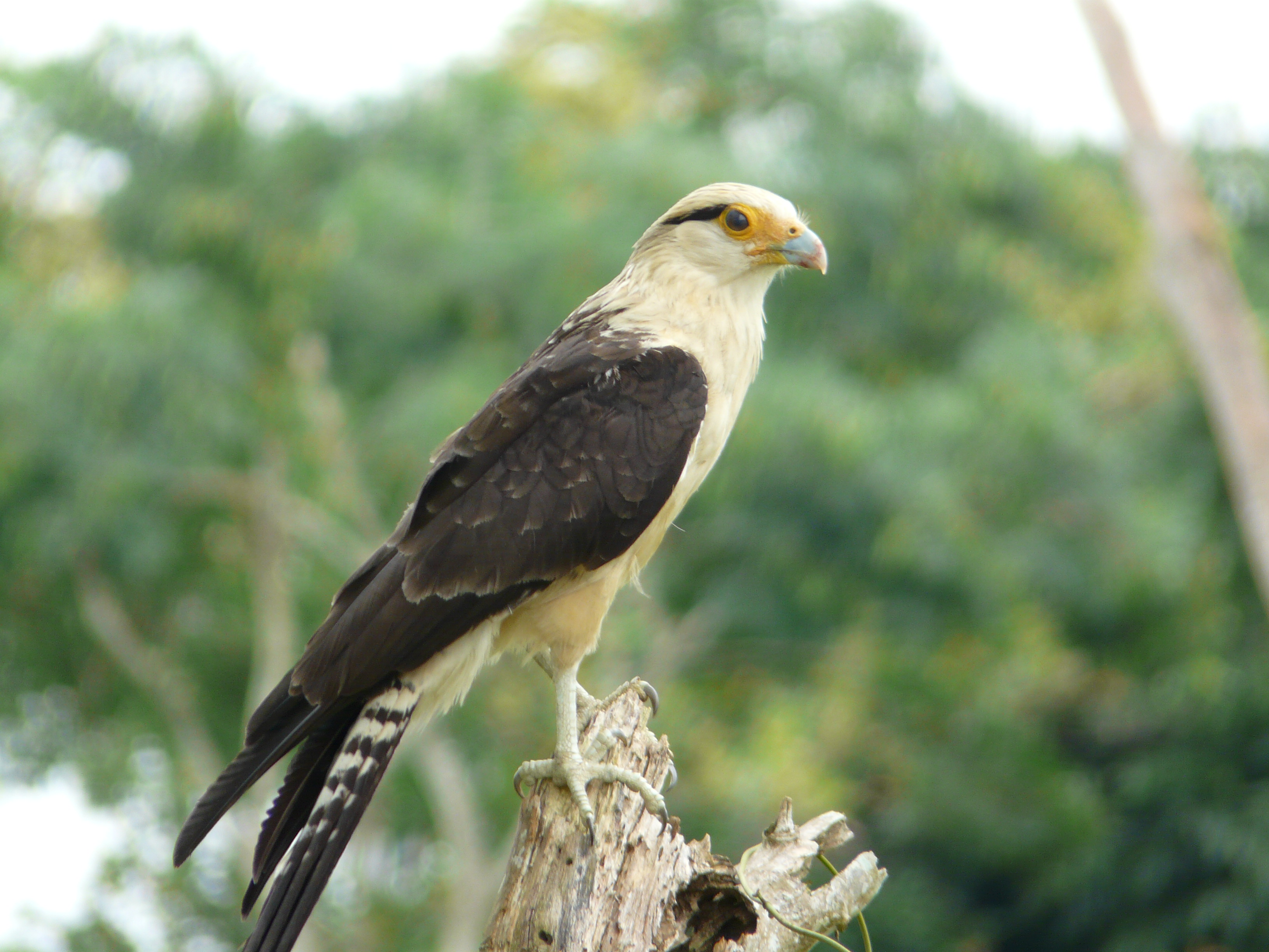 Caracara cabeciamarillo - Milvago Chimachima Tomada en Acacias, Meta, COlombia Taked on Acacias, Meta, Colombia